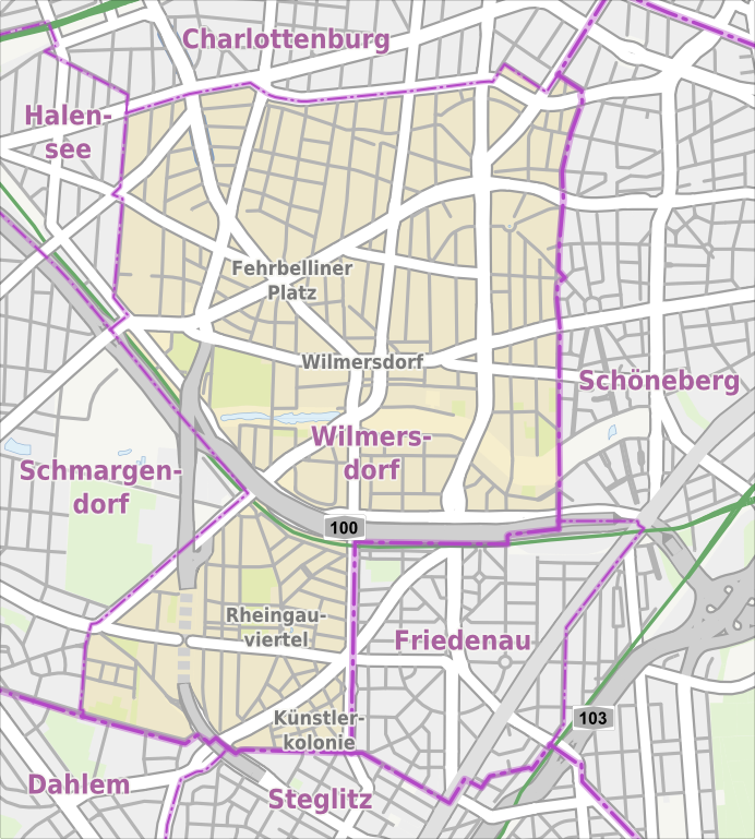 Übersichtskarte der Straßen und Ortslagen in Berlin-Wilmersdorf